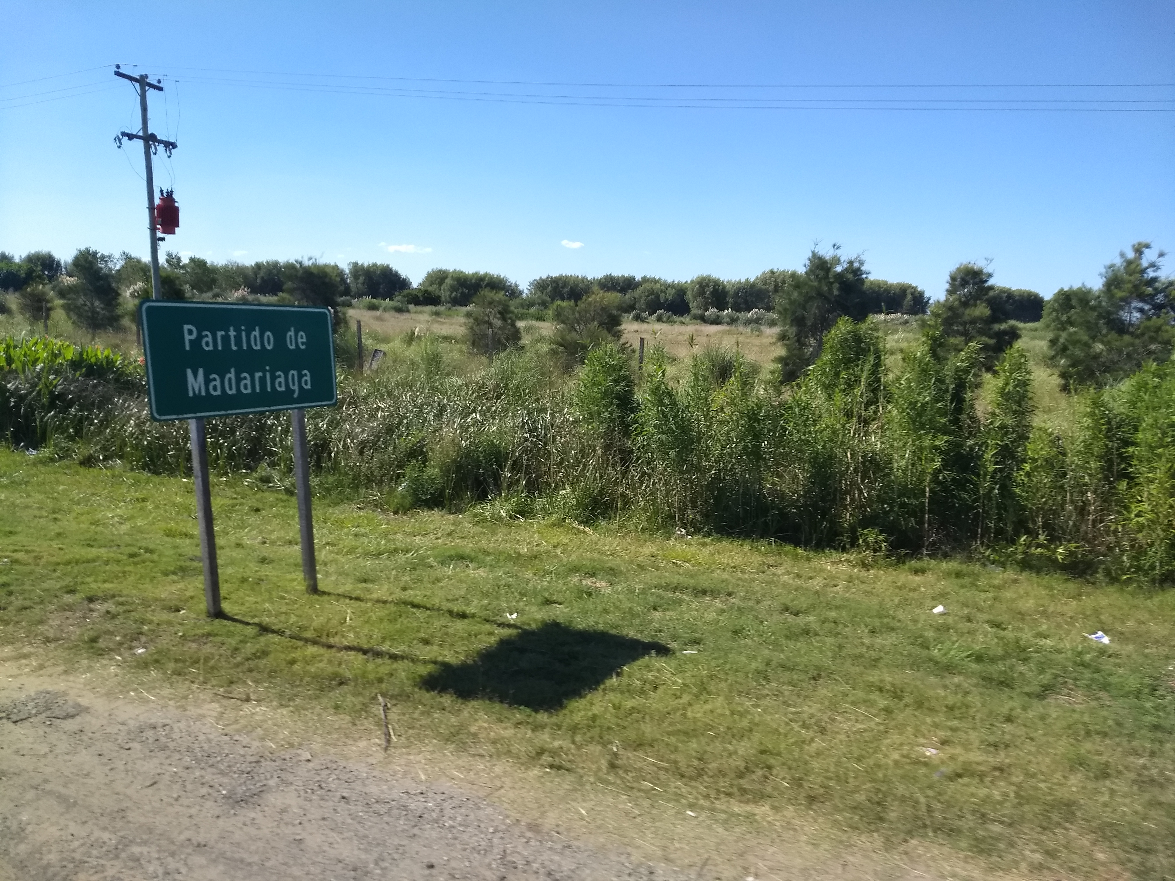 Cartel sobre la ruta provincial 74, cerca de la rotonda con la ruta provincial 11, indicando el ingreso al partido de General Juan Madariaga, provincia de Buenos Aires.